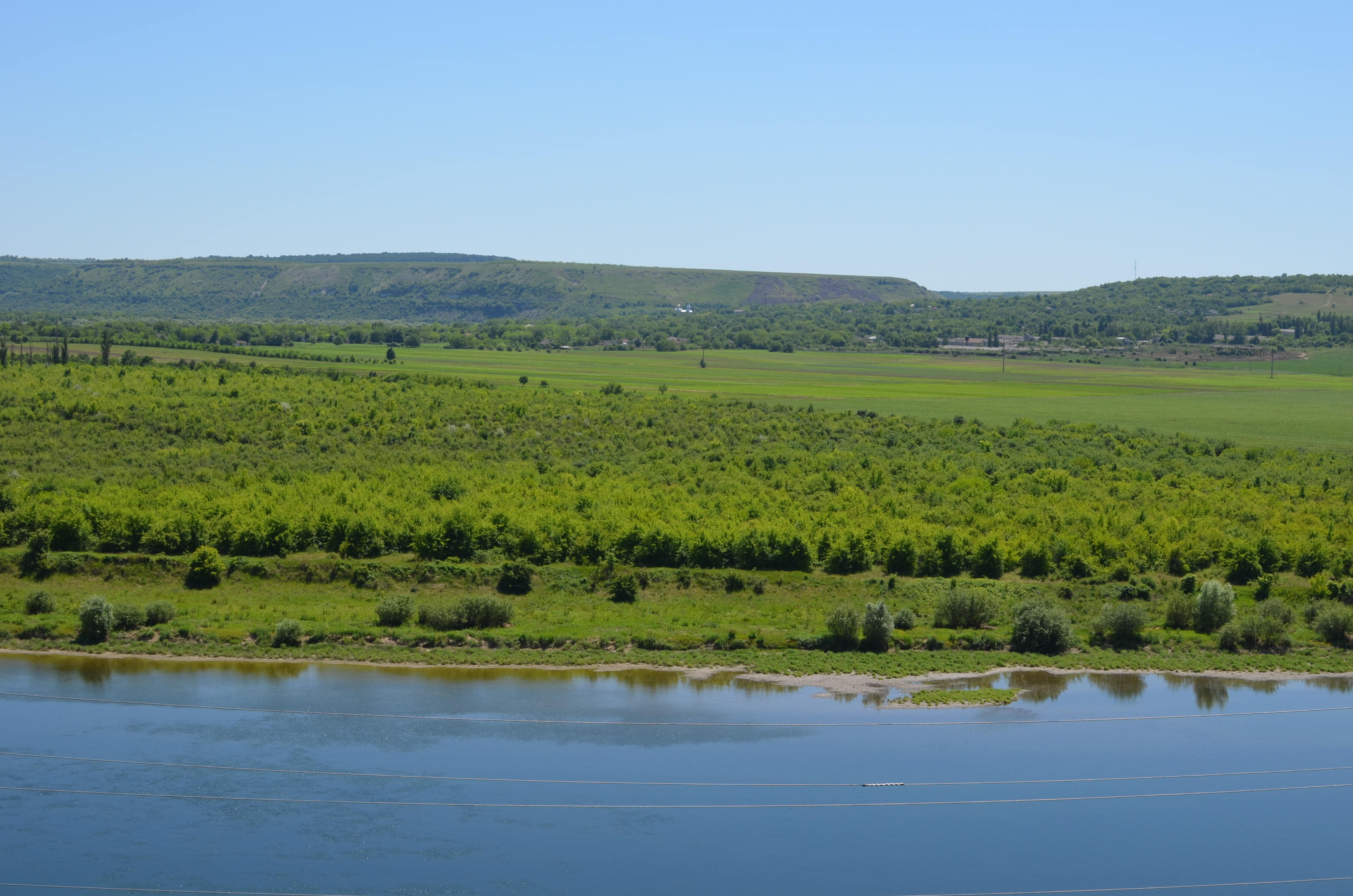 Вид на село Наславча в Молдові з Нагорянської скелі